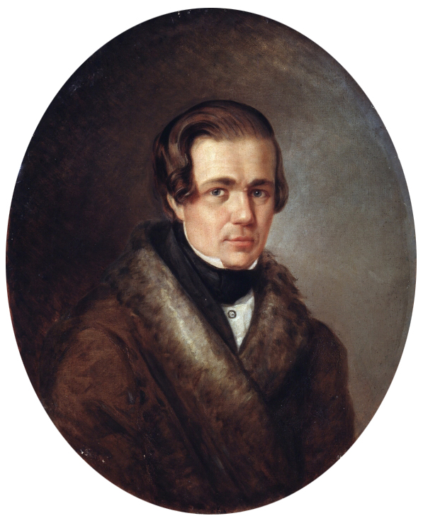 Алексей Васильевич Кольцов в 1838 году. Портрет масляными красками.